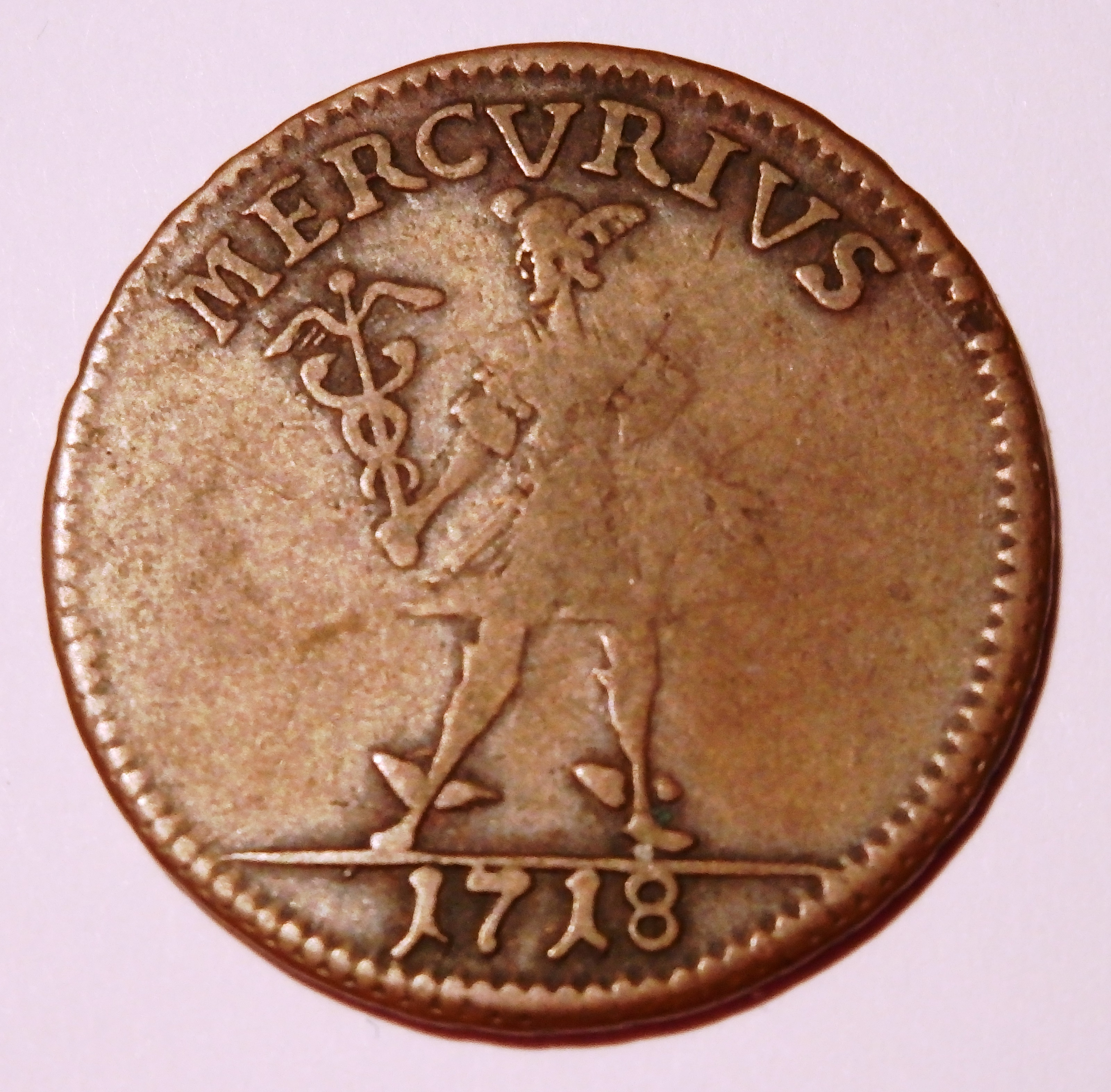 Mercur auf schwedischen Kupferdaler von 1718